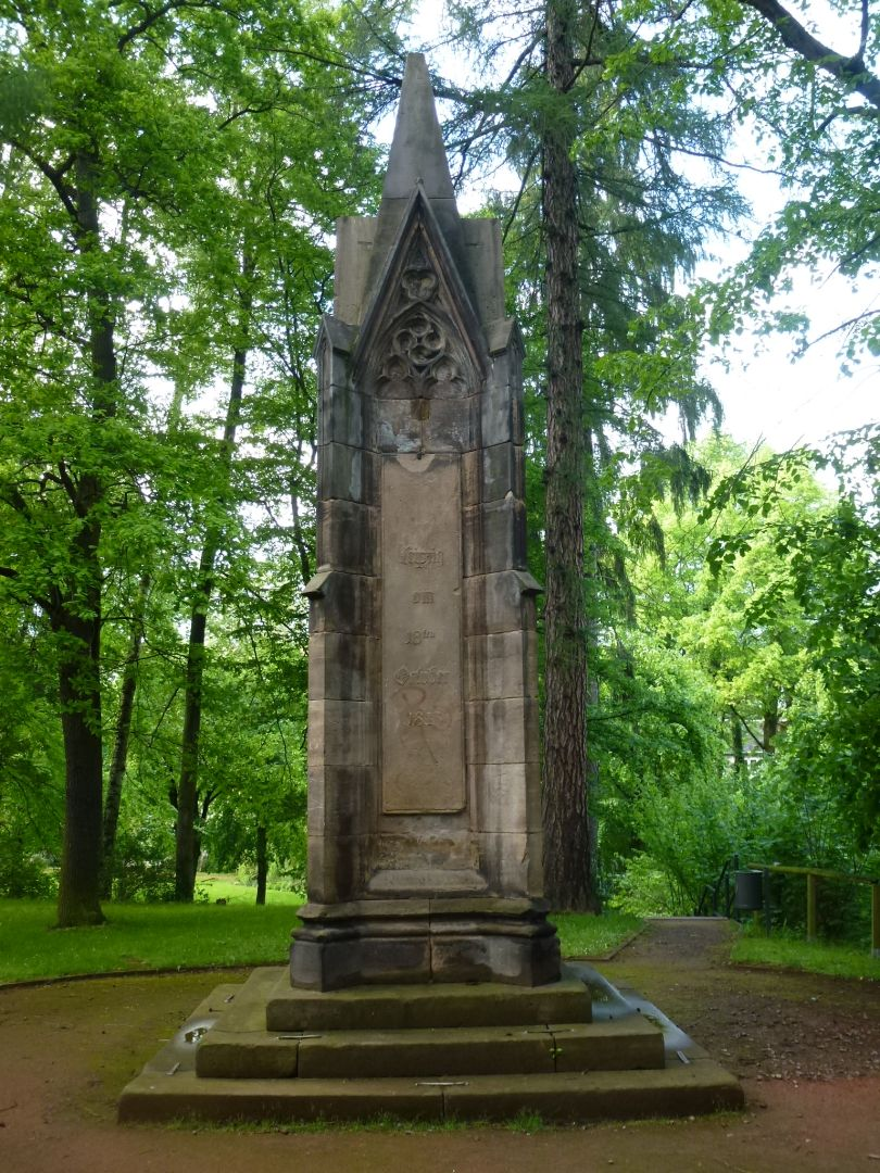 Völkerschlachtdenkmal in Heiligenstadt,die Inschrift lautet:"Leipzig am 18ten October 1813".